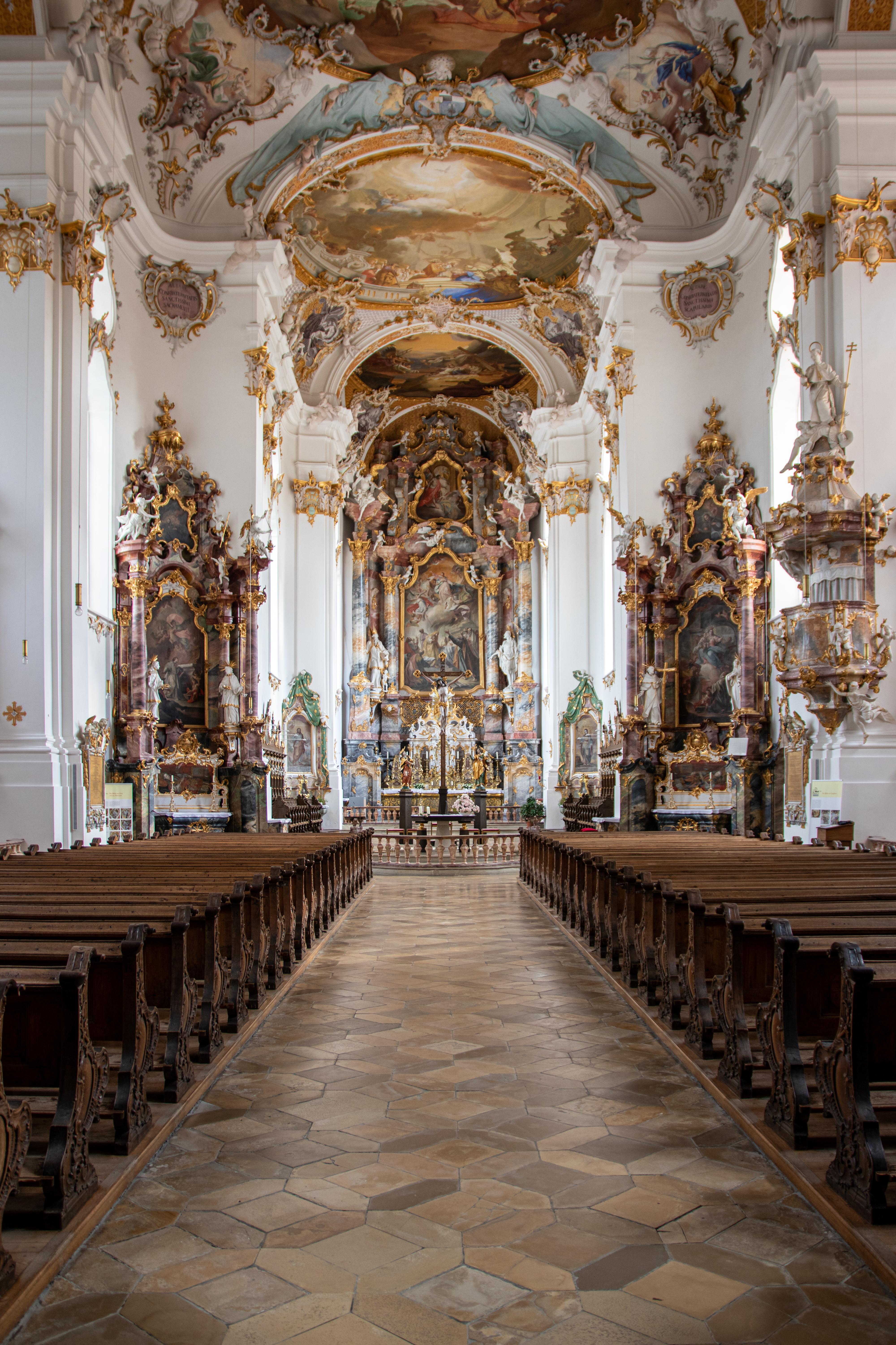 Klosterkirche Roggenburg – Innenraum